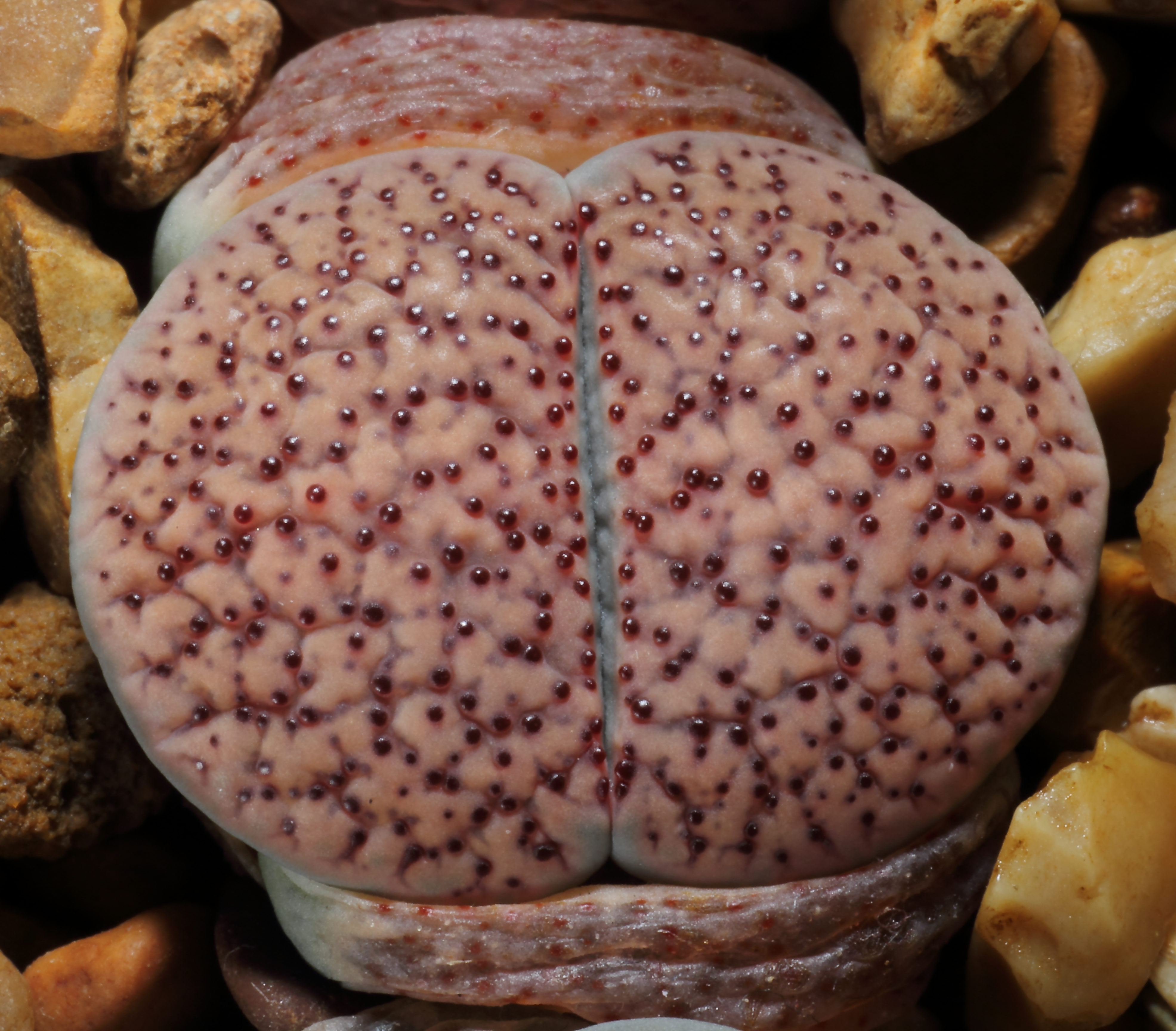 Privat samling.